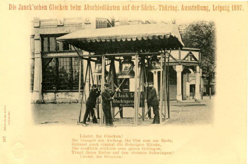 Sächsisch-Thüringische Industrie- und Gewerbeausstellung Leipzig 1897 - Abschiedsläuten